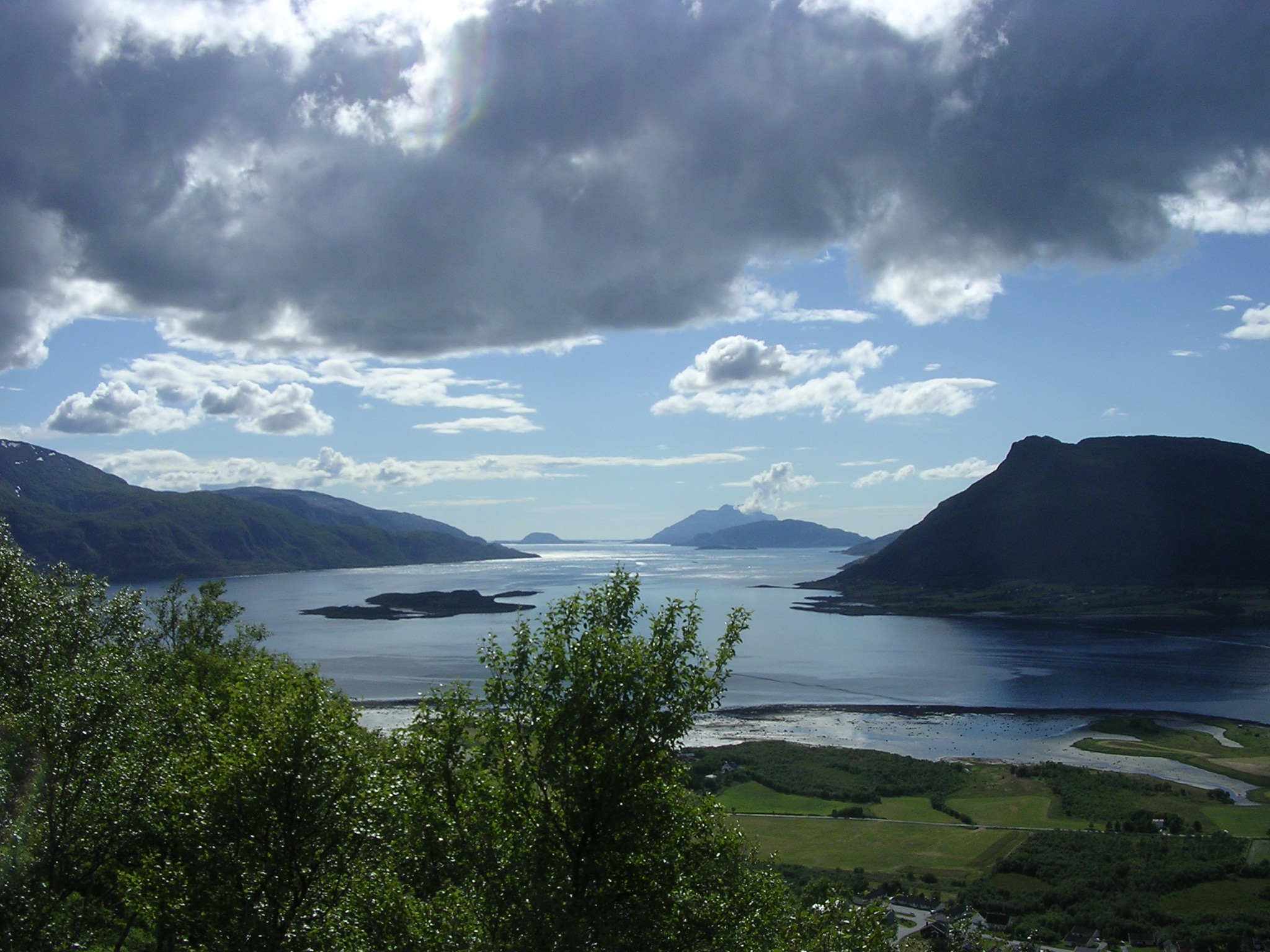 Utløpet av Ranfjorden sett fra lia over Nesna. I bakgrunnen ser vi fra venstre fastlandet i Leirfjord og øyene Skorpa, Dønna, Løkta og Hugla.